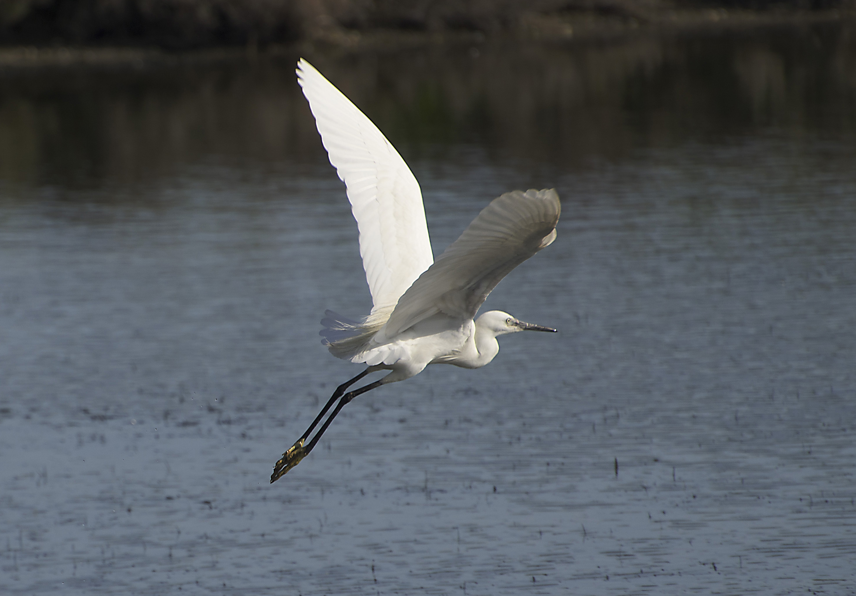 Seidenreiher (Egretta garzetta). Laguna di Venezia, Italien